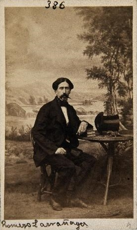 Gregorio Romero Larrañaga, fotografía de J. Laurent, Museo de Historia de Madrid